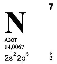 Азот - N